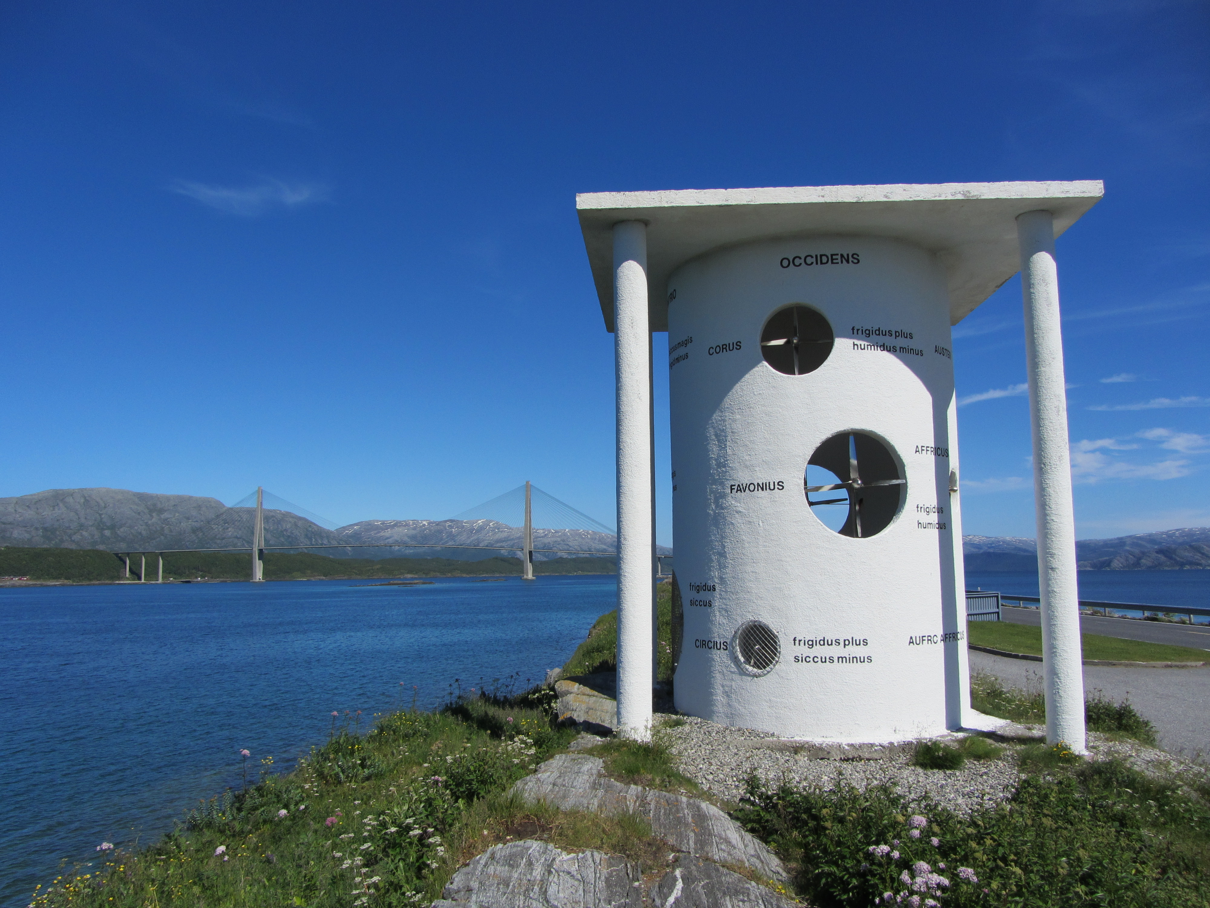 "Vindenes hus" er Alstahaug kommunes bidrag til Skulpturlandskap Nordland.